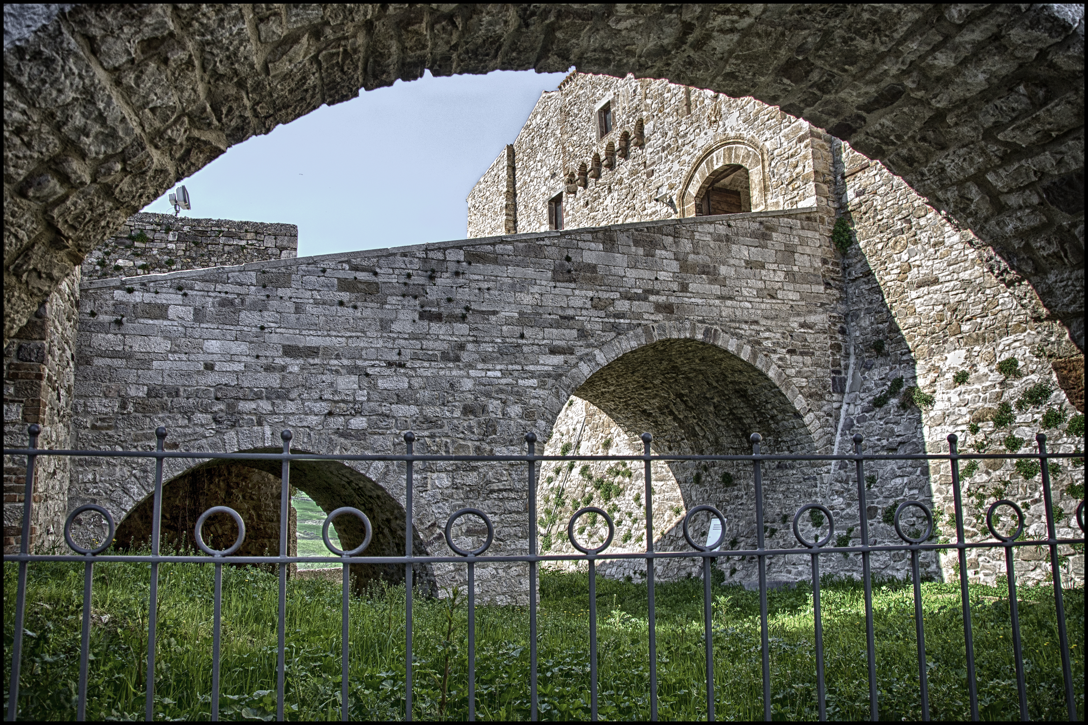 Castello - MIBAC This is a photo of a monument which is part of cultural heritage of Italy.